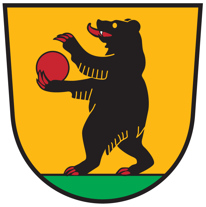 Wappen von Irschen